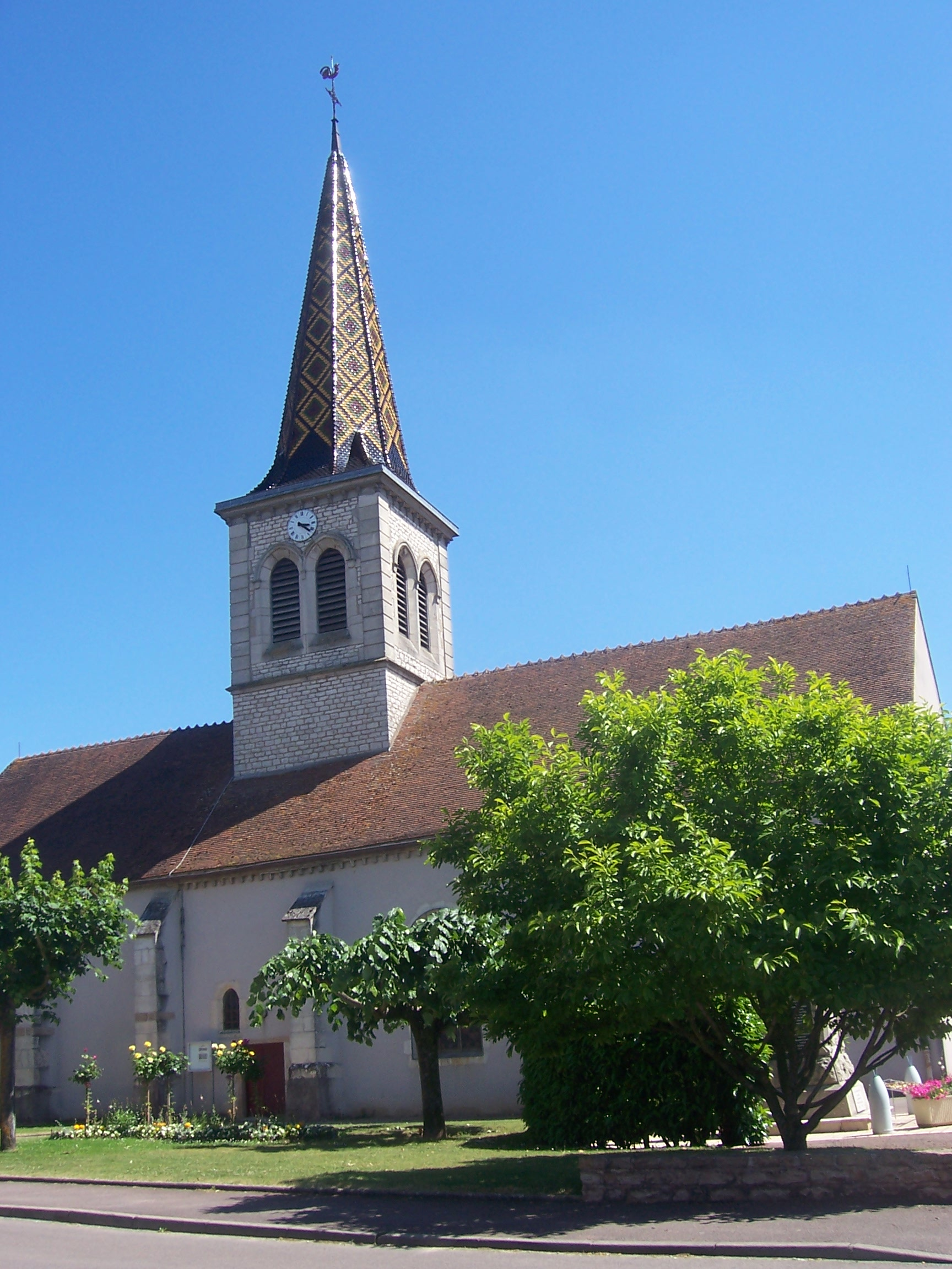 Eglise d'Ouroux-sur-Saône